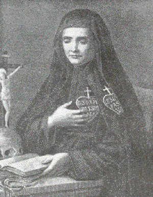 Portrait de Marie Crucifiée Costantini